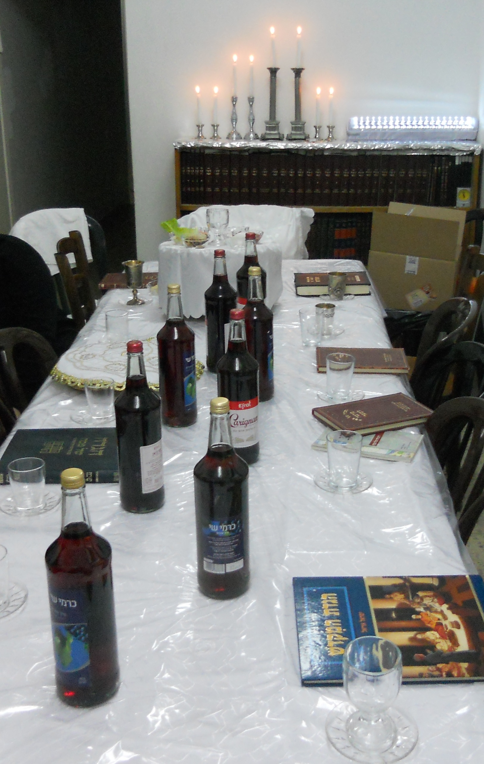 שולחן ערוך לליל הסדר